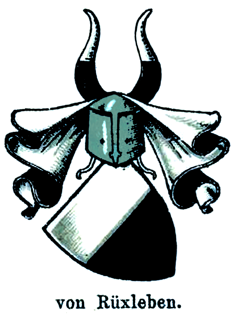 Wappen derer von Rüxleben